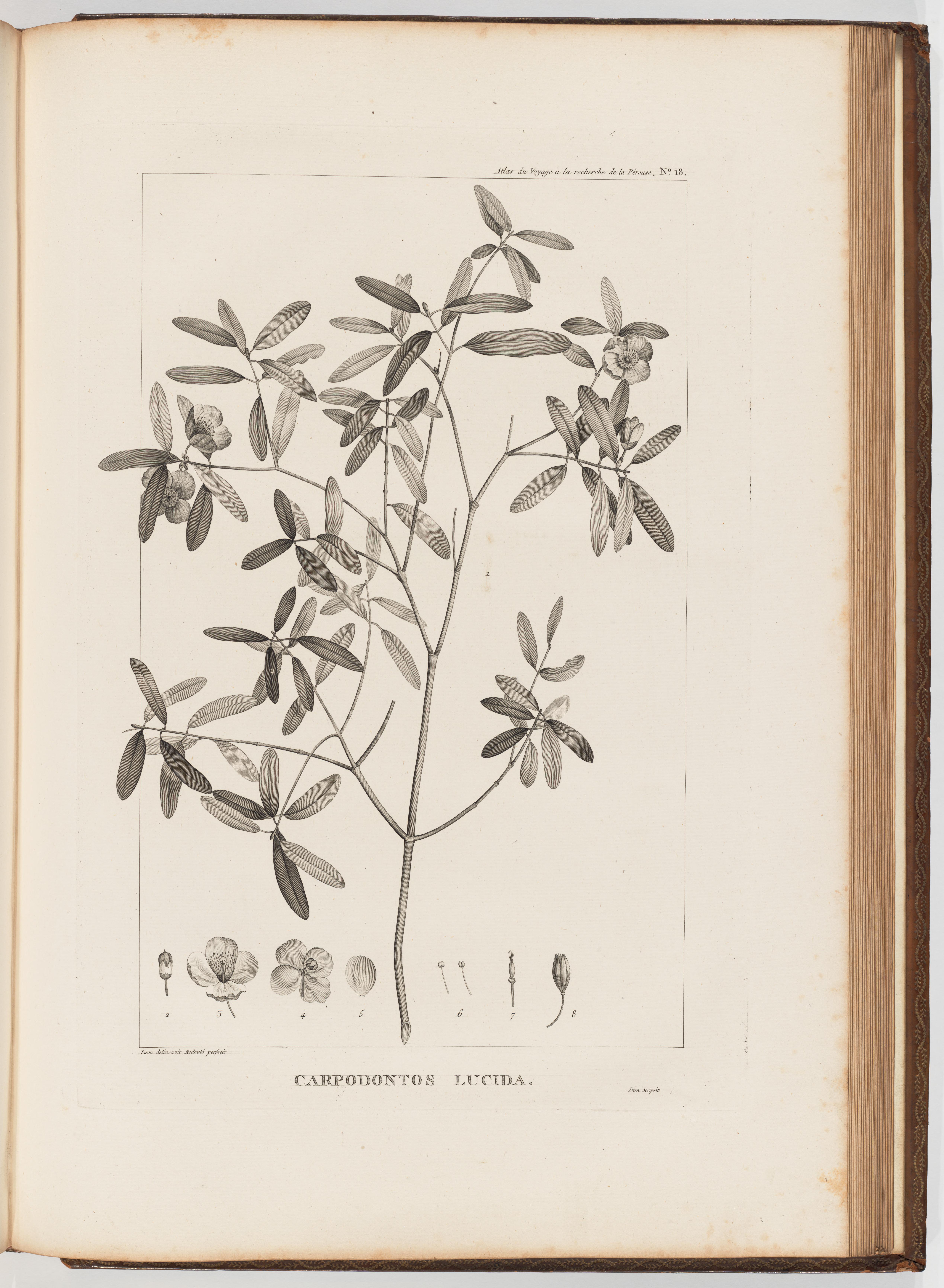 Voyage de La Pérouse autour du monde /publié conformément au décret du 22 avril 1791, et rédigé par L.A. Milet-Mureau.